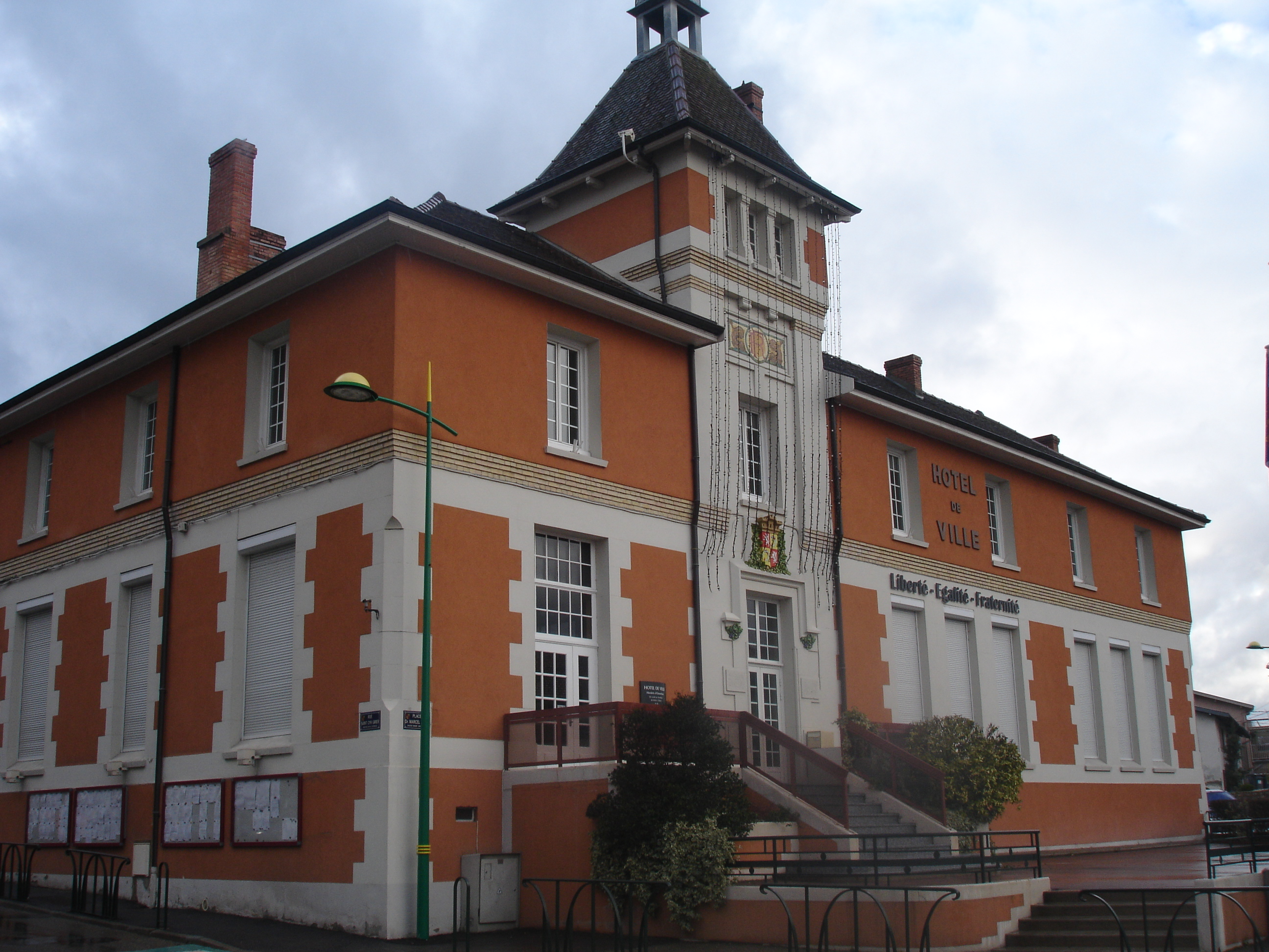 La Verpillière (38) : La mairie